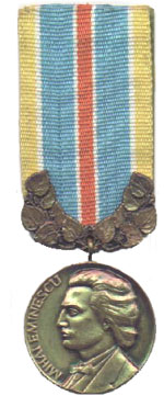 Медаль Республики Молдова «Mihai Eminescu»